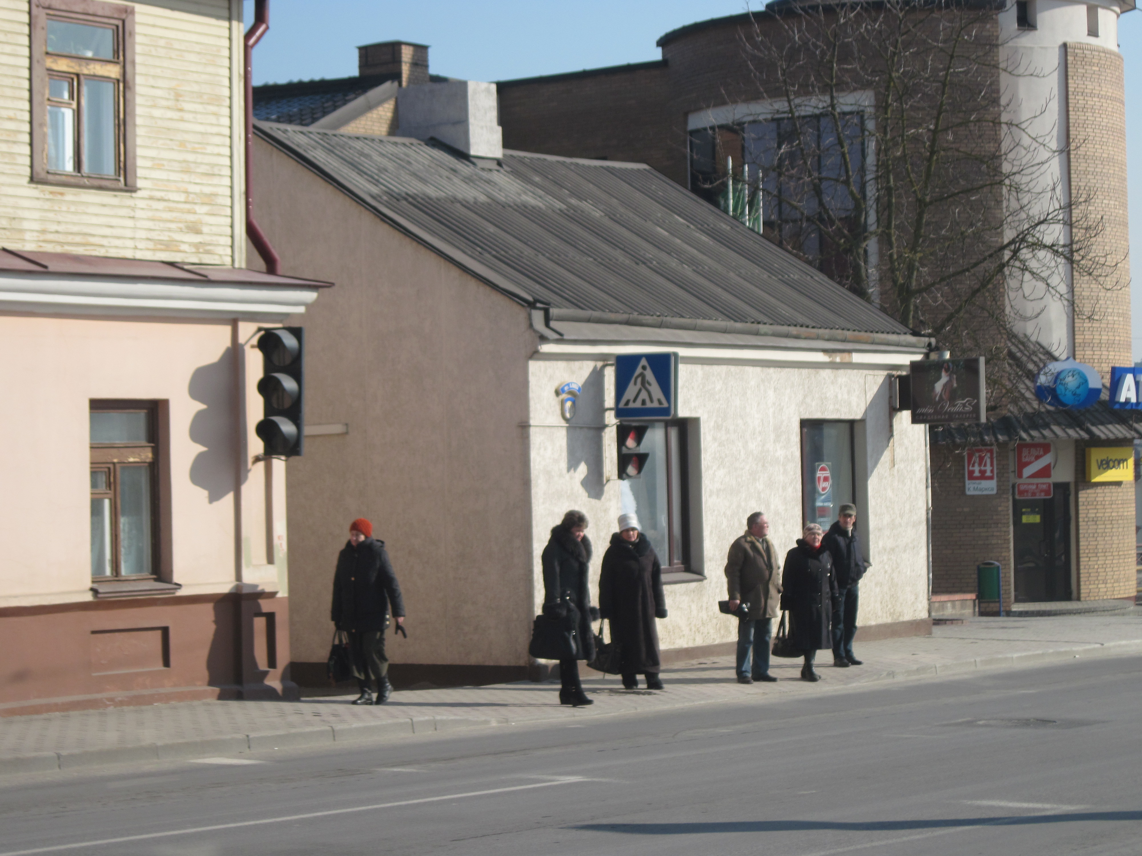 Забудова гістарычнага цэнтра Гродна, вуліца К. Маркса, 40А